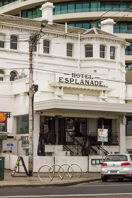 Esplanade Hotel, St Kilda, Melbourne, Australia